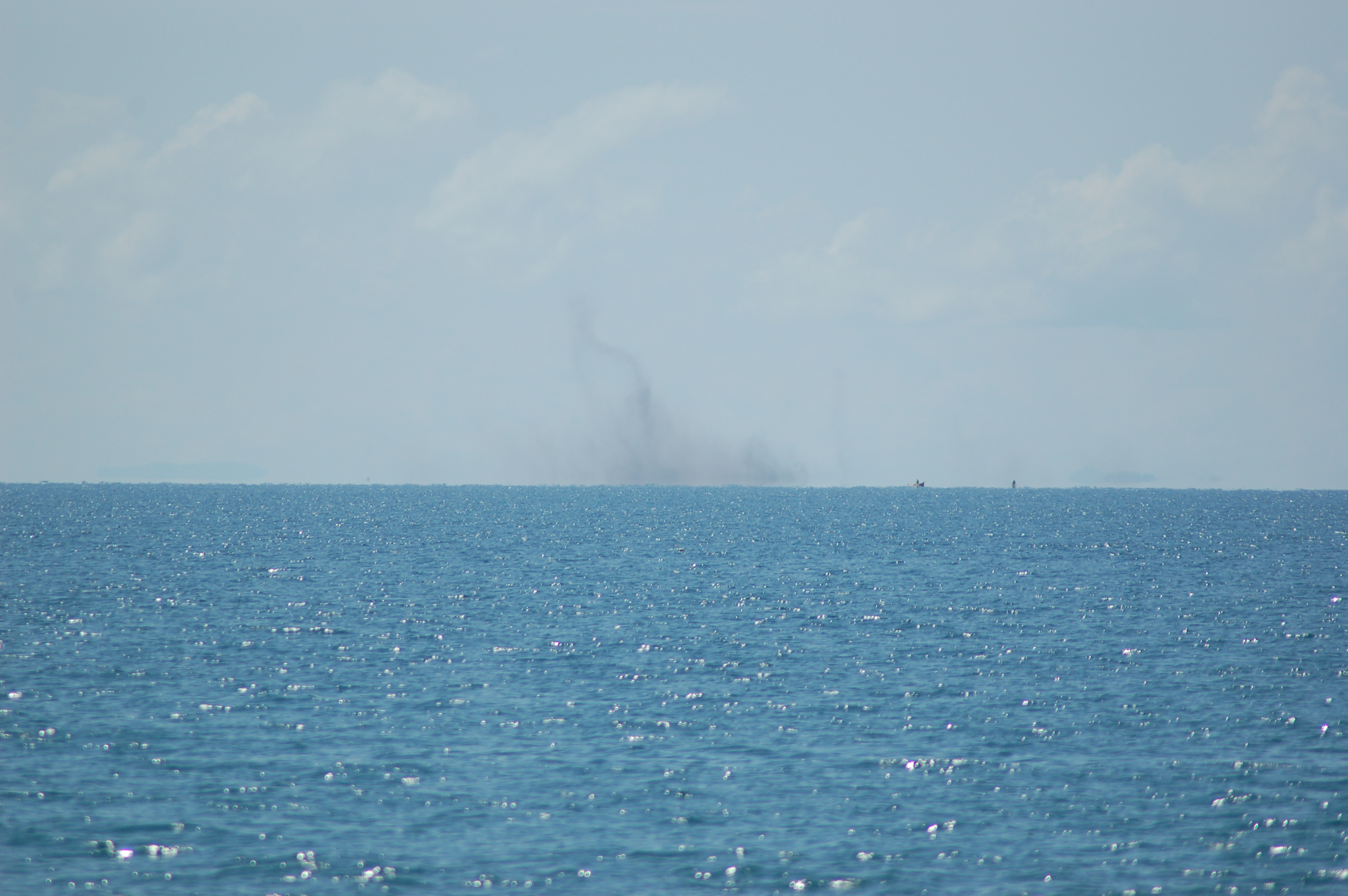 Lake flies, Lake Malawi